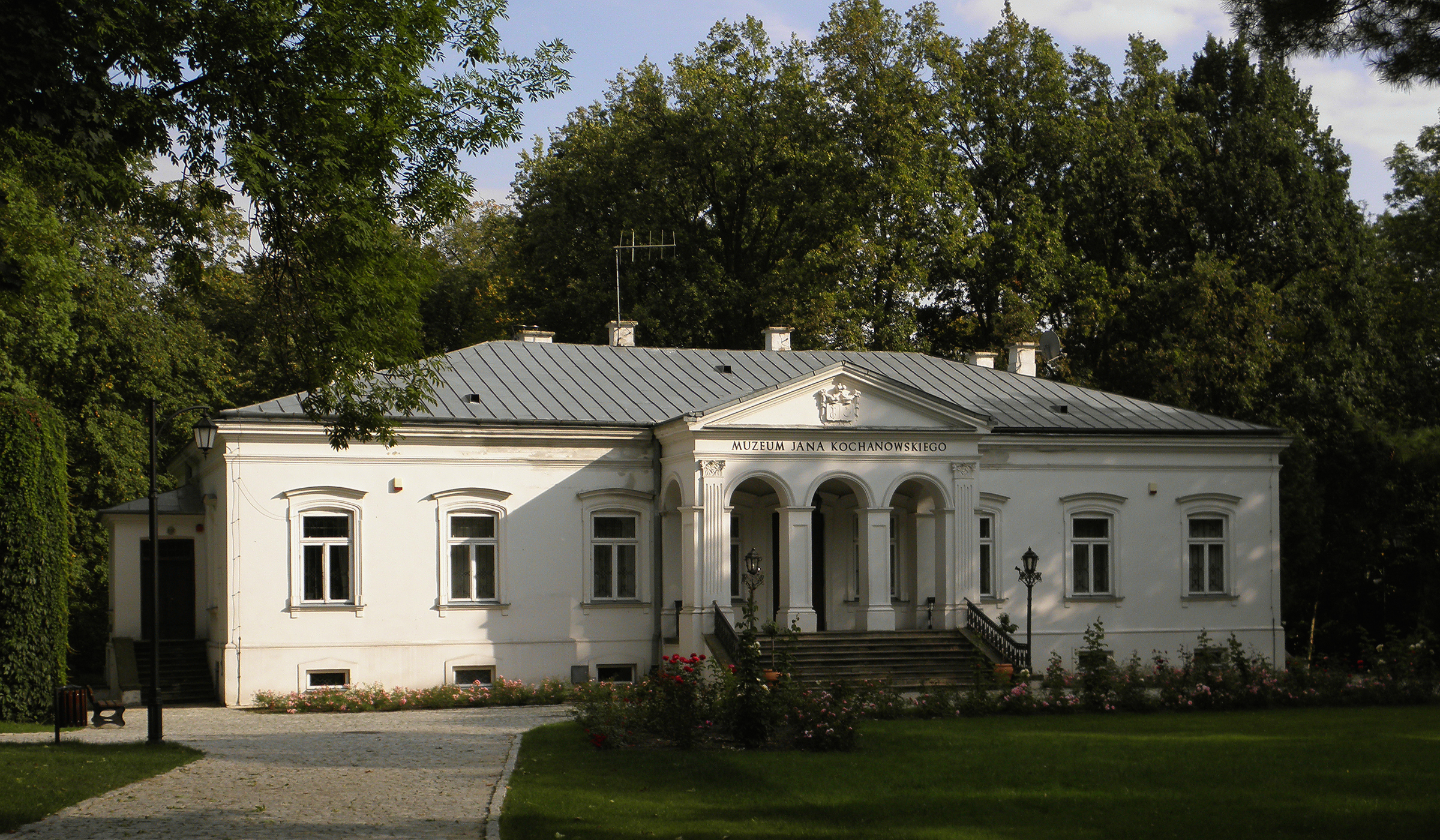 Dwór Jabłonowskich w Czarnolesie.